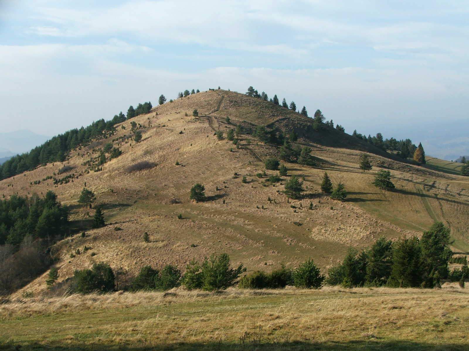 Wysoki Wierch. Widok ze zboczy Durbaszki